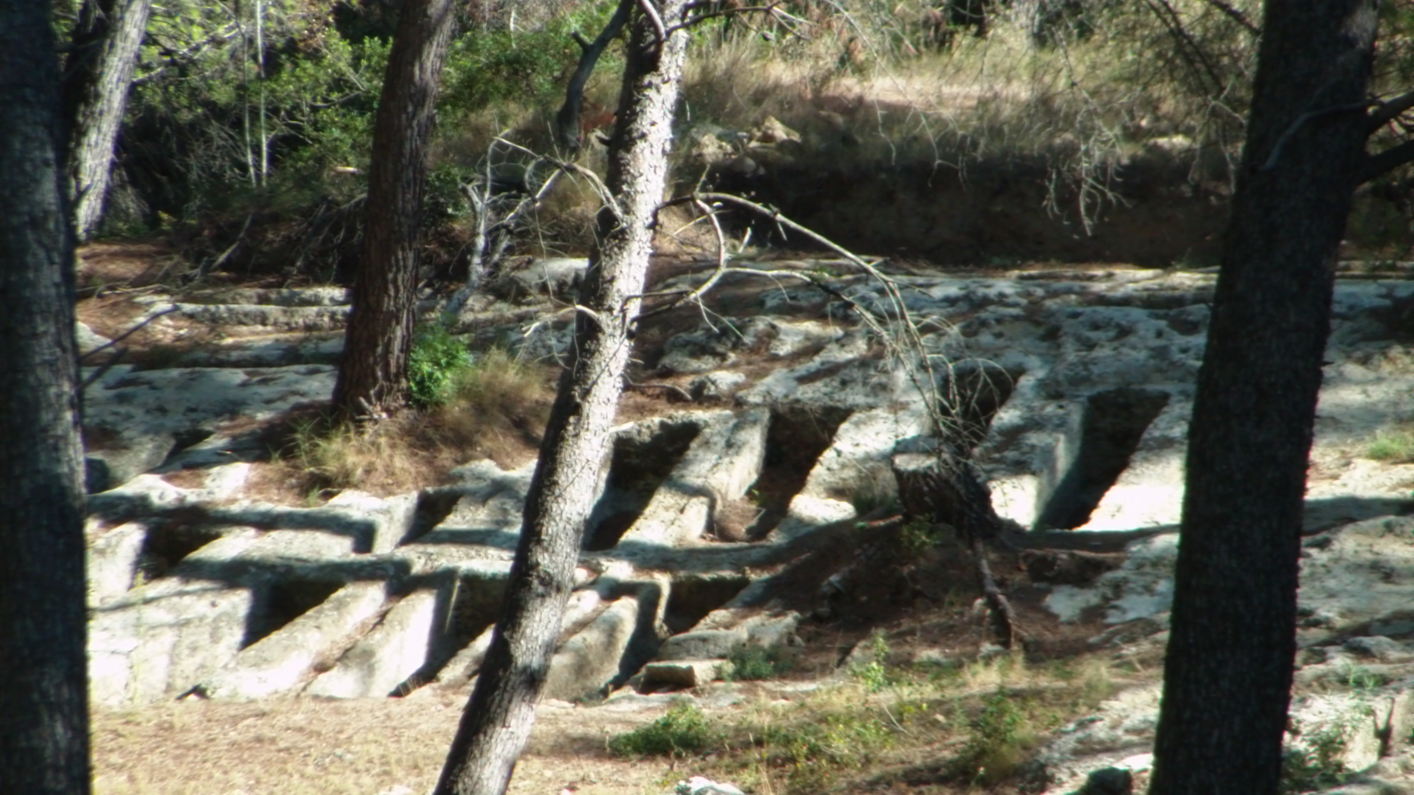 L'oppidum de Saint-Blaise est un site archéologique majeur en Méditerranée occidentale, situé sur la commune de Saint-Mitre-les-Remparts